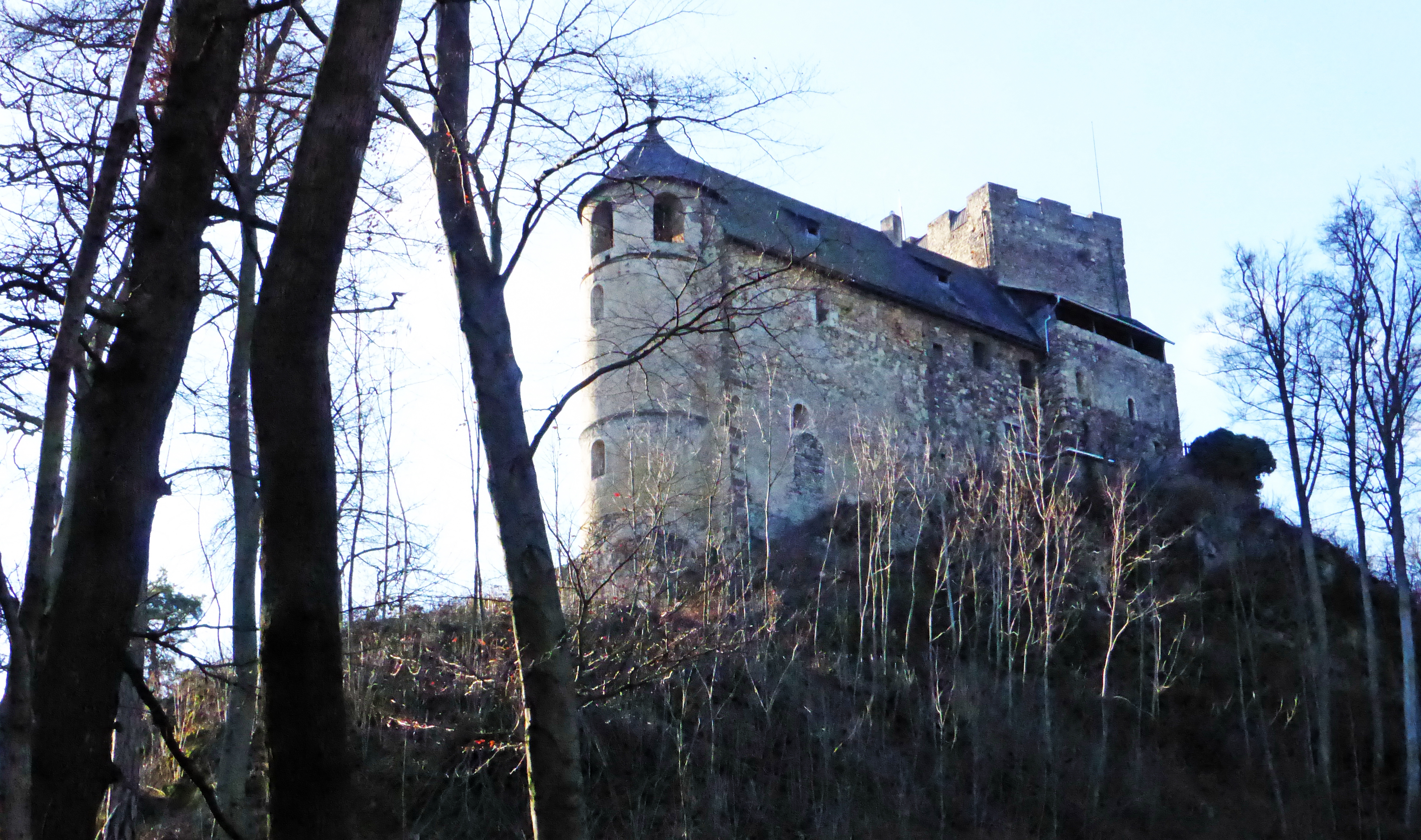 Burgruine Gösting